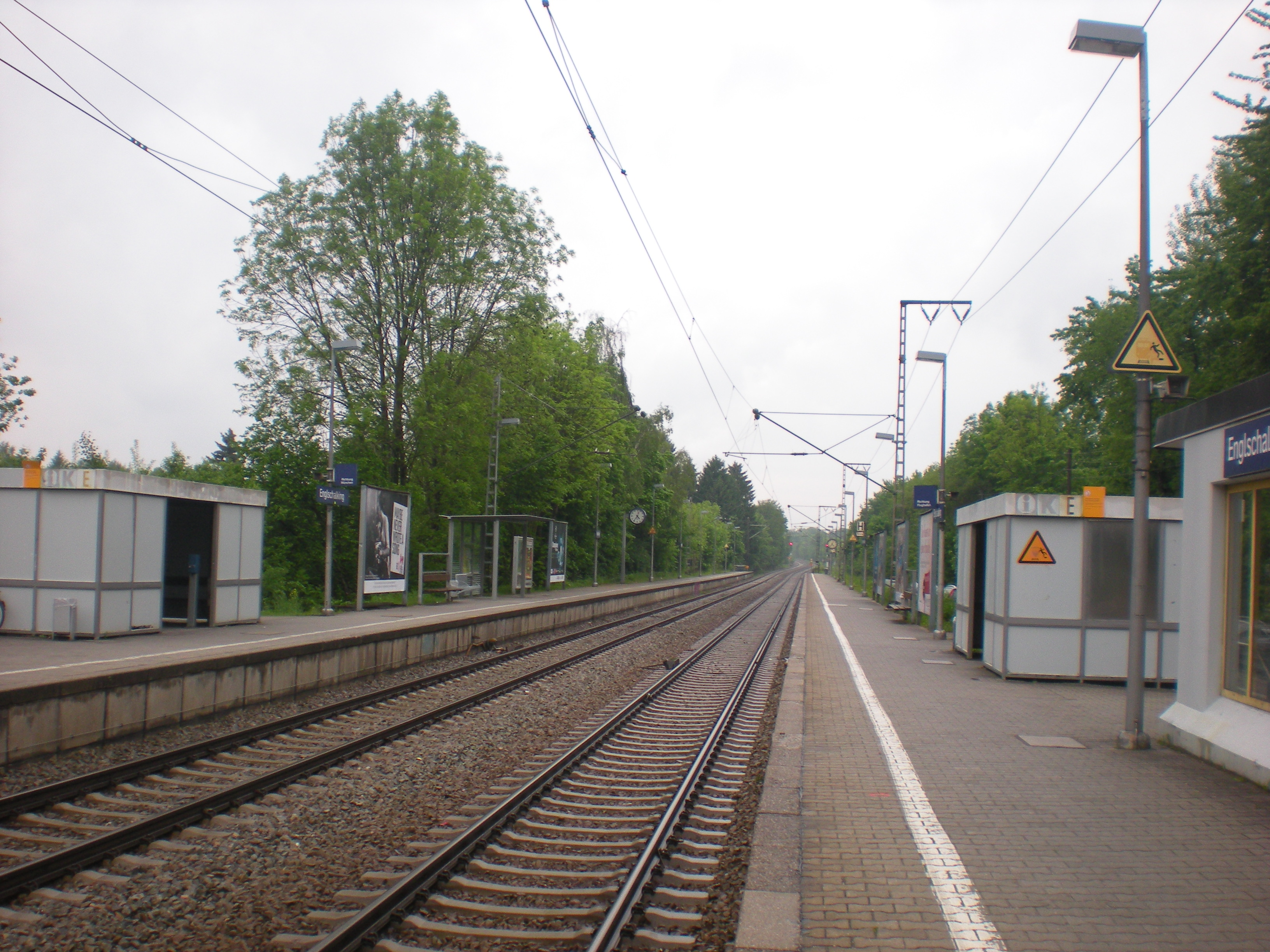 Bahnhof München-Englschalking